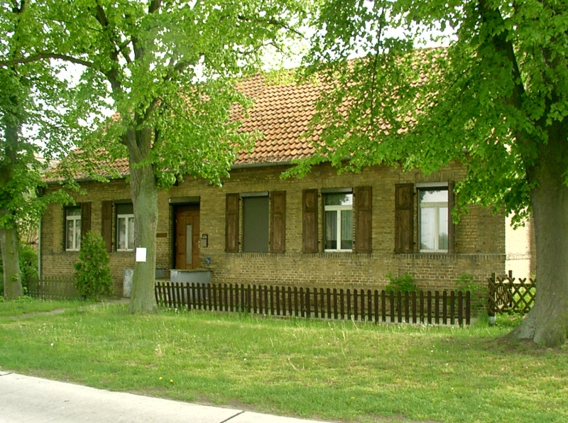 Dorfschule Tremsdorf